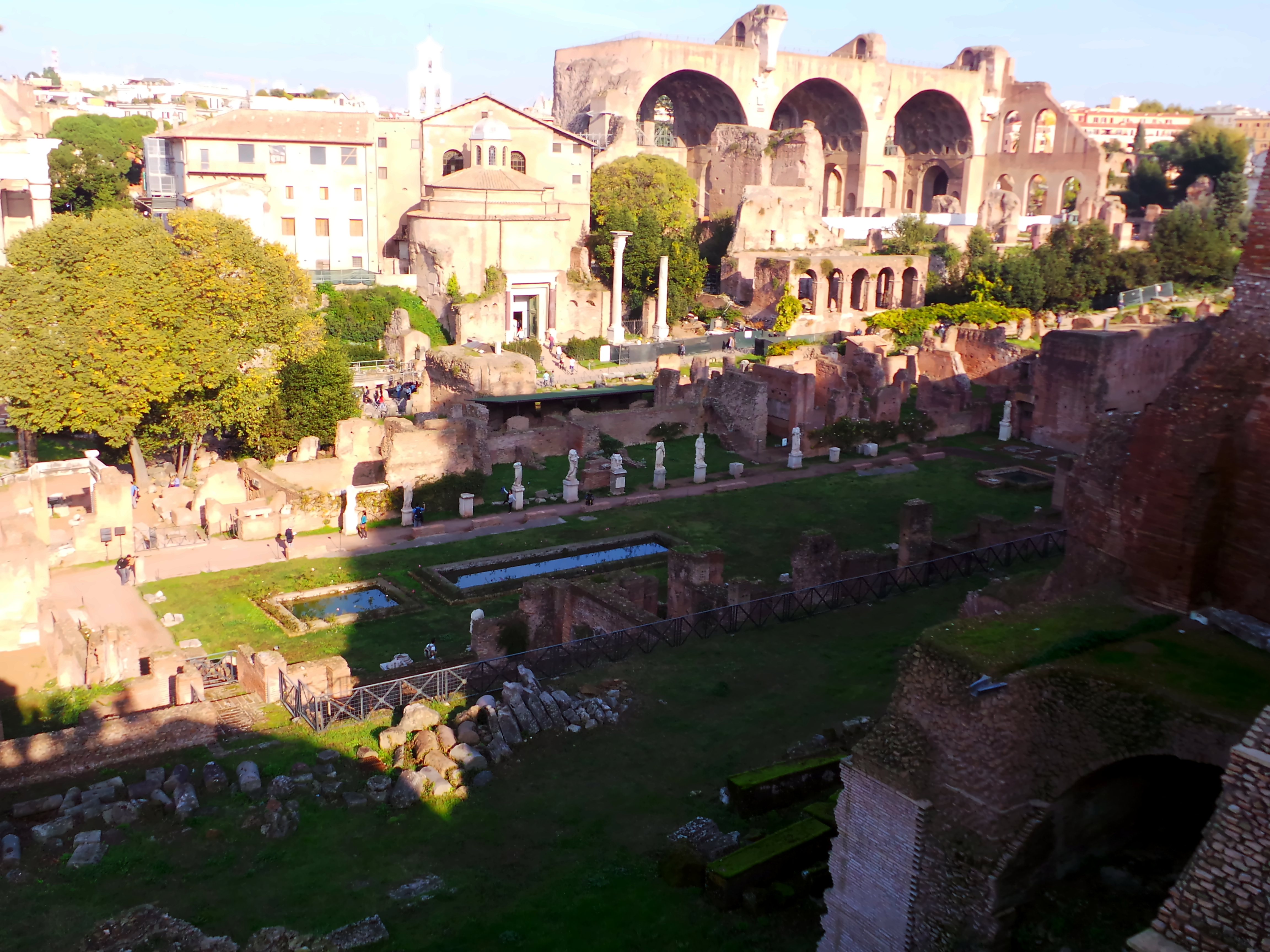 Haus der Vestalinnen von der Westseite gesehen.